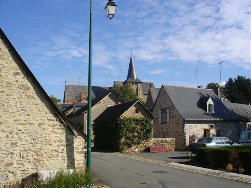 L'eglise Saint-Martin de Thorigné-d'Anjou (Maine-et-Loire, France).